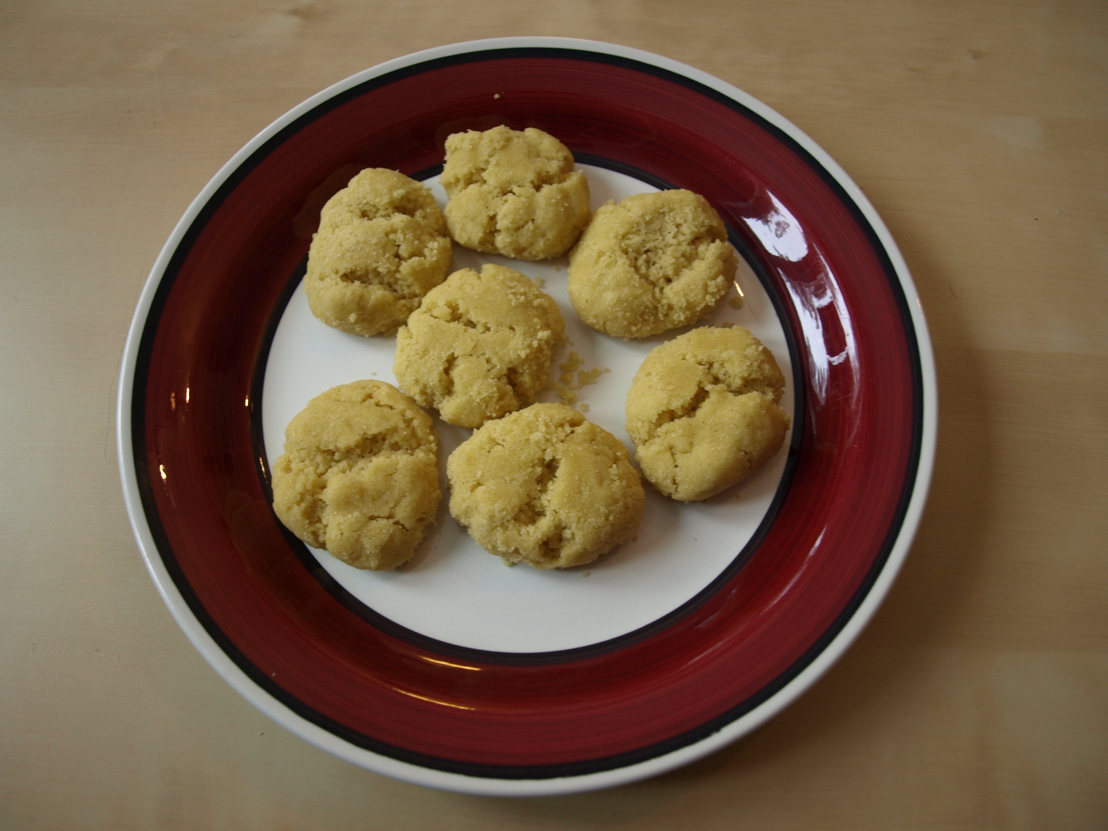 Kaksorten drömmar på en tallrik